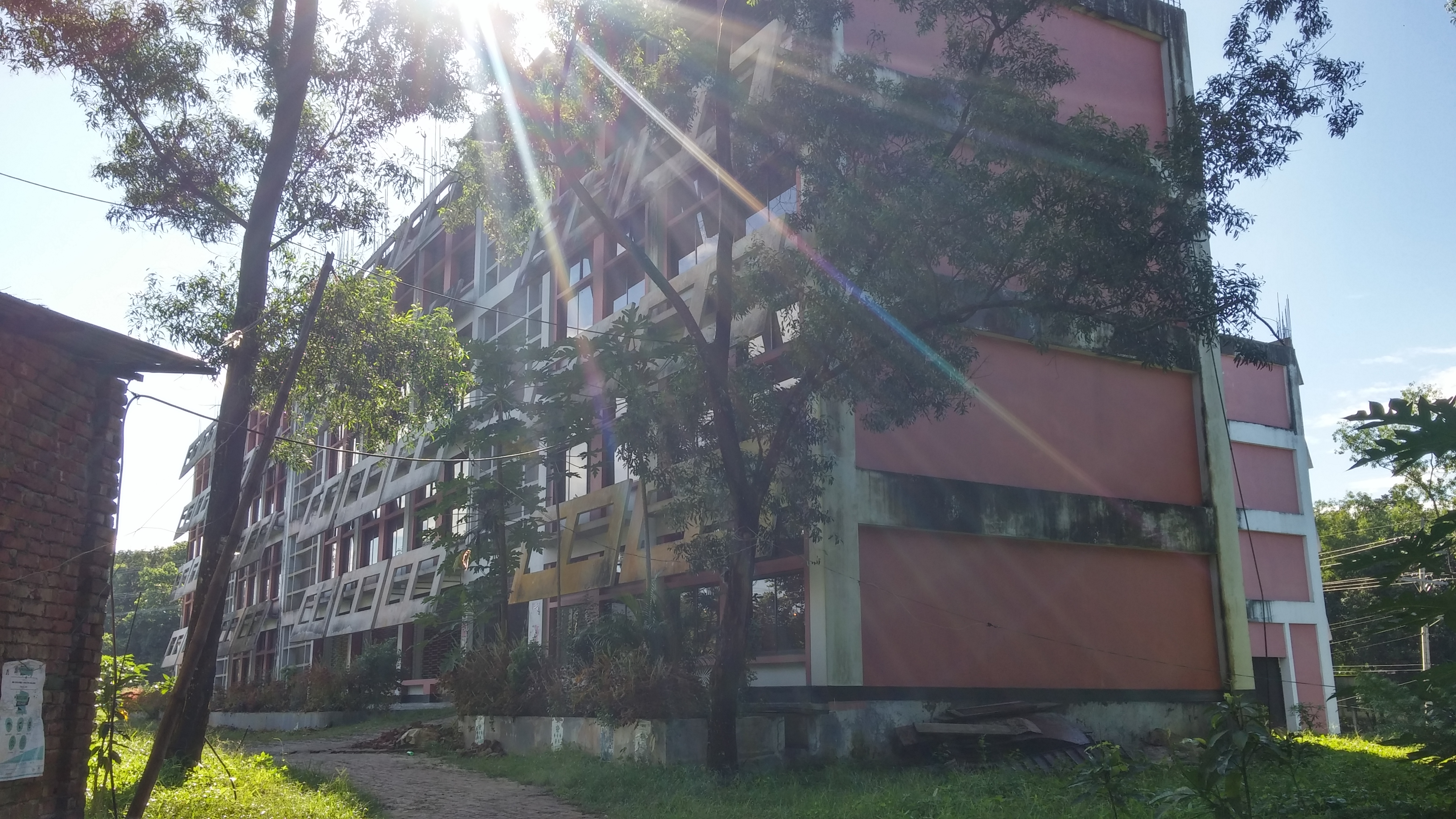 PME Building